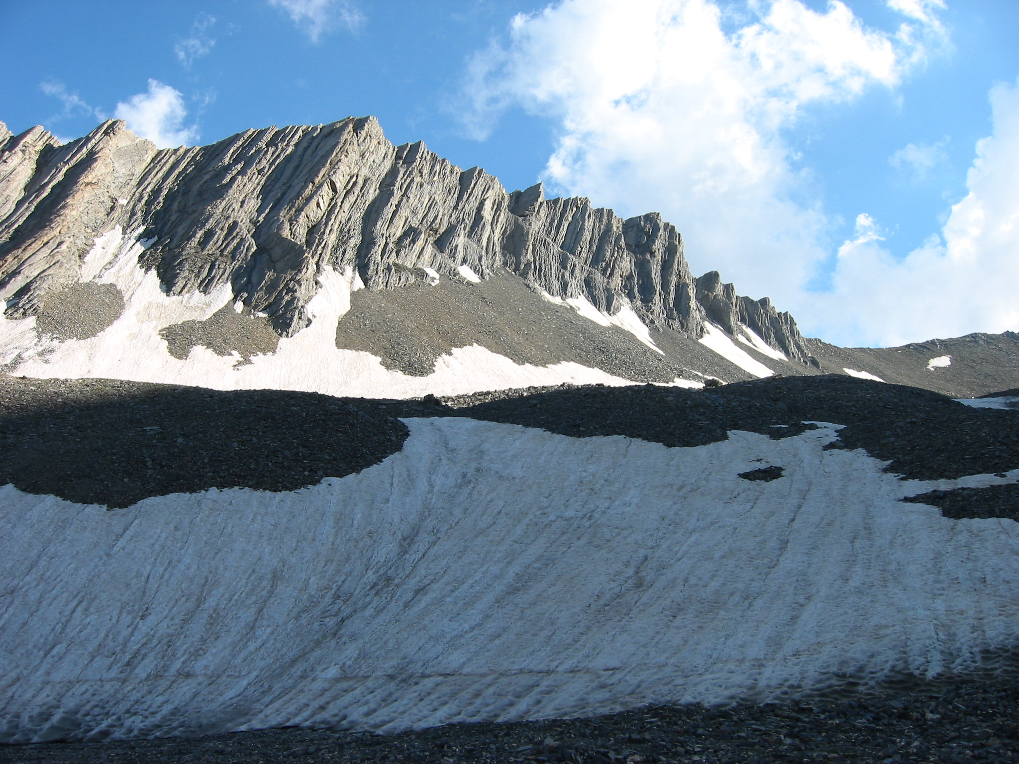 Keli Lake 06-10.08.2005